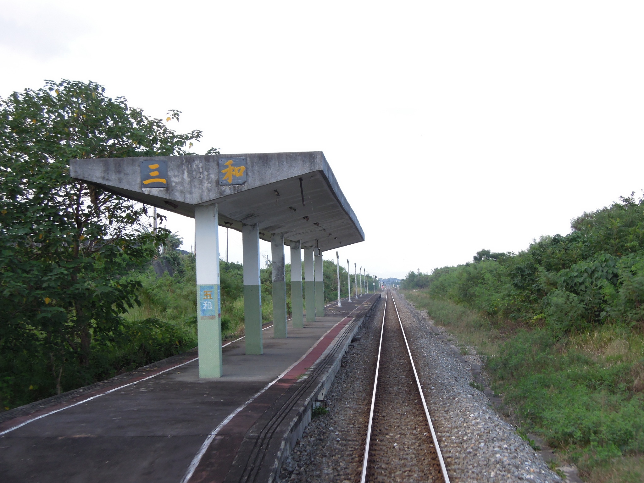 臺灣鐵路管理局三和車站月台。